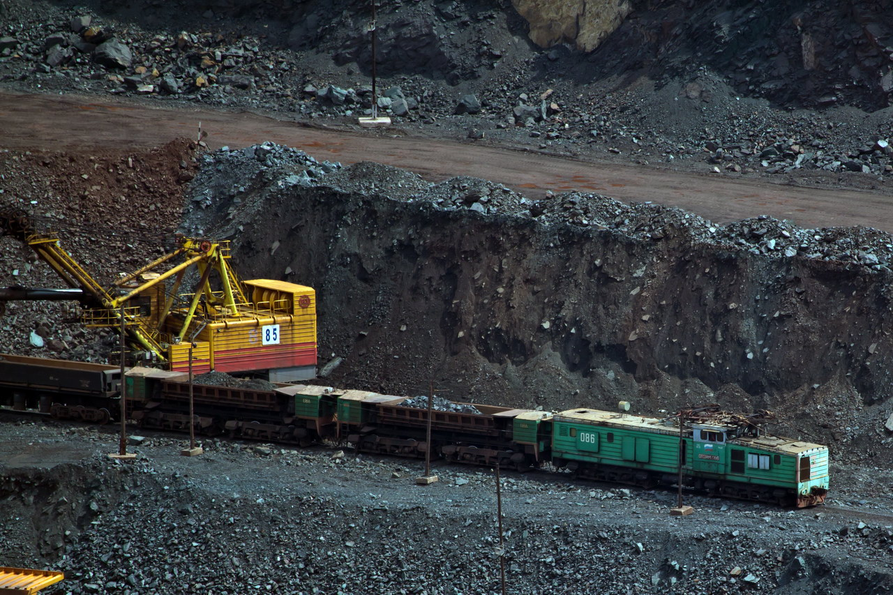 Тяговый агрегат ОПЭ1Ам-086 в карьере Михайловского горно-обогатительного комбината